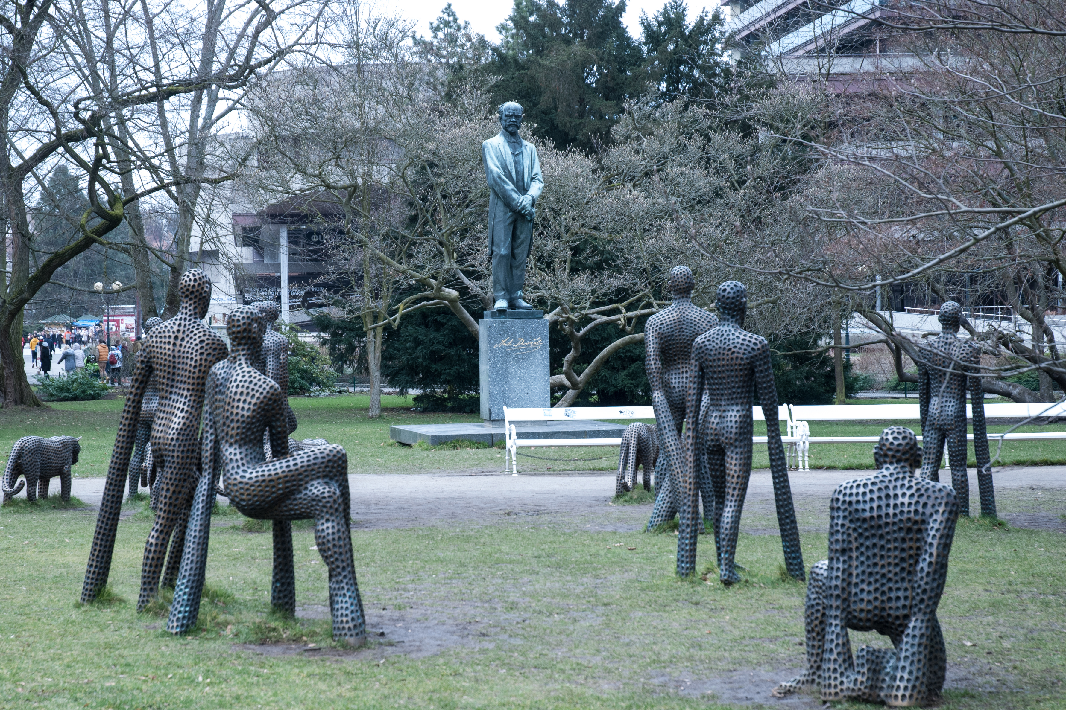 Část sousoší „Smečka“ sochaře Michala Gabriela u sochy Antonína Dvořáka ve Dvořákových sadech v Karlových Varech